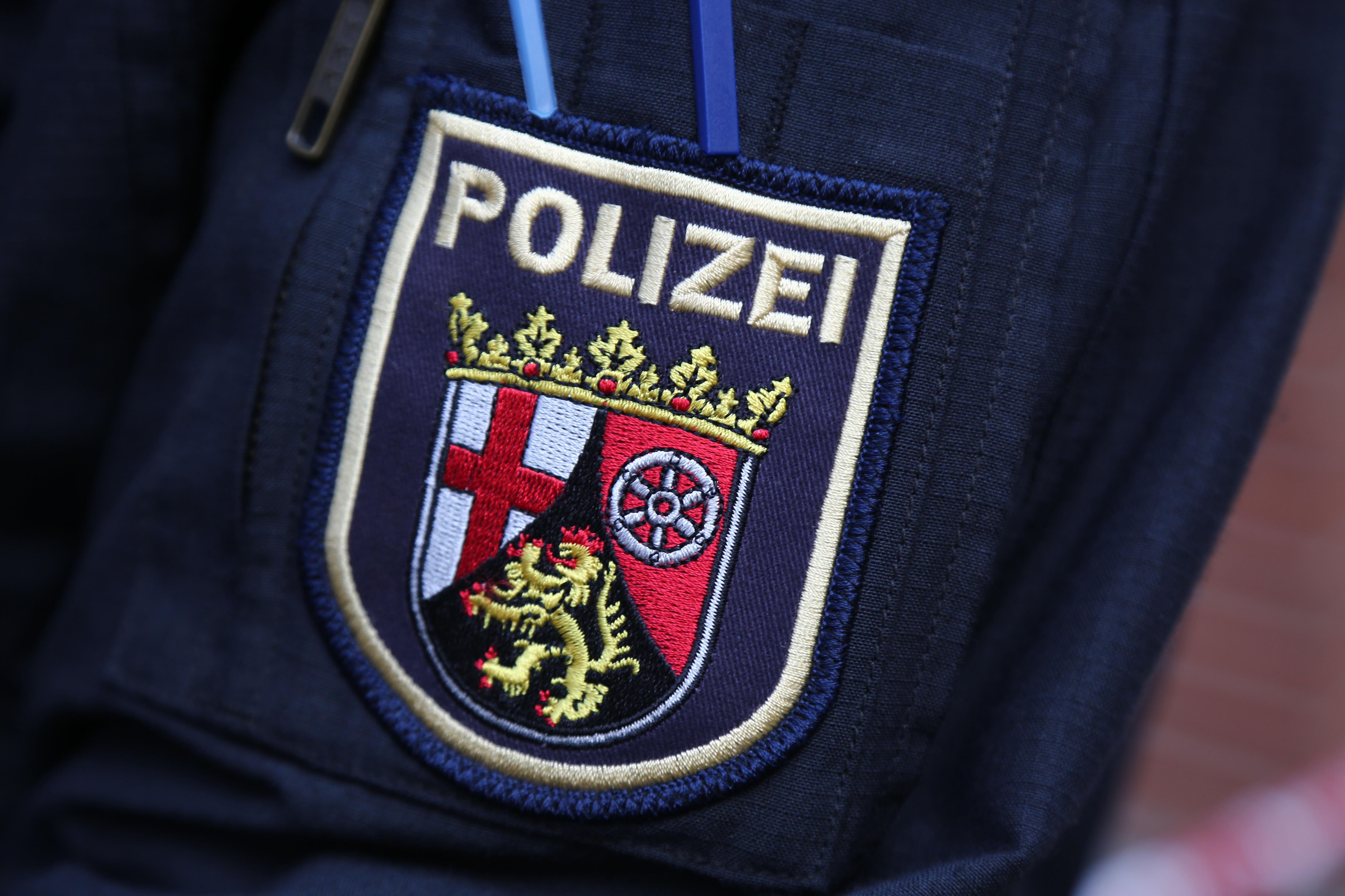 Ärmelwappen der Polizei Rheinland-Pfalz